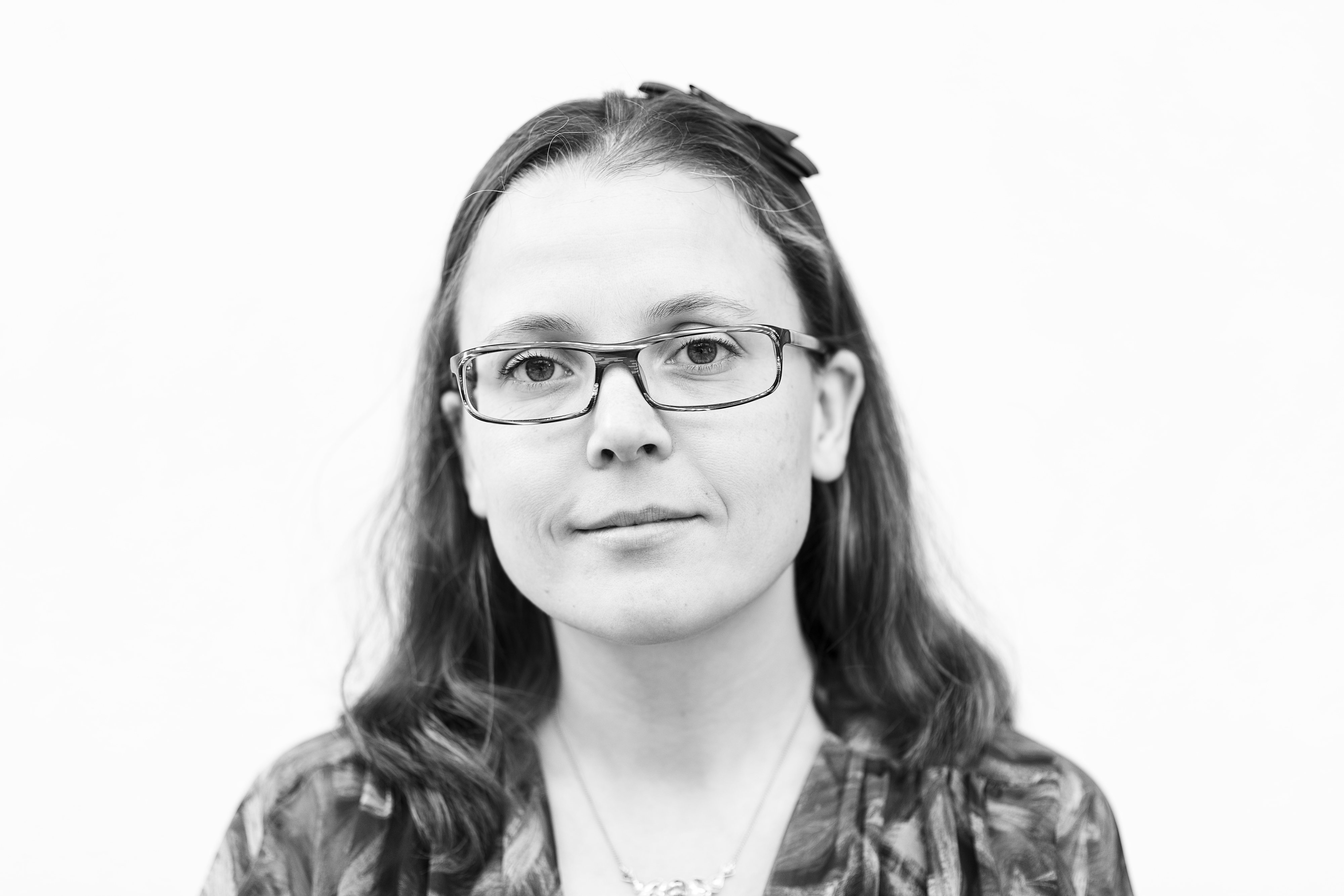 Porträt der Südtiroler Autorin und Dramaturgin Selma Mahlknecht